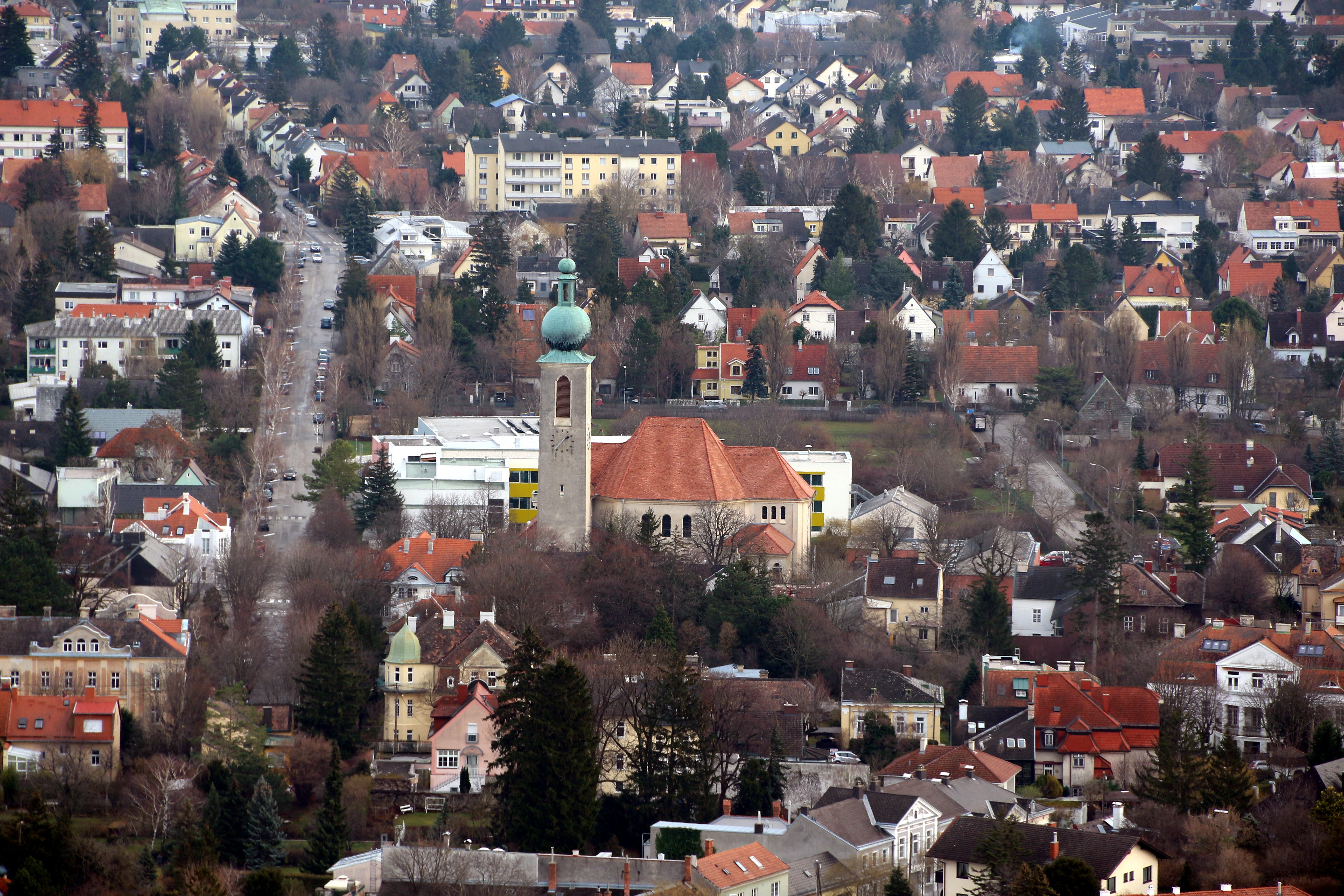 Kath. Pfarrkirche hl. Christoph von der Burgruine Rauheneck (Westen) aus gesehen